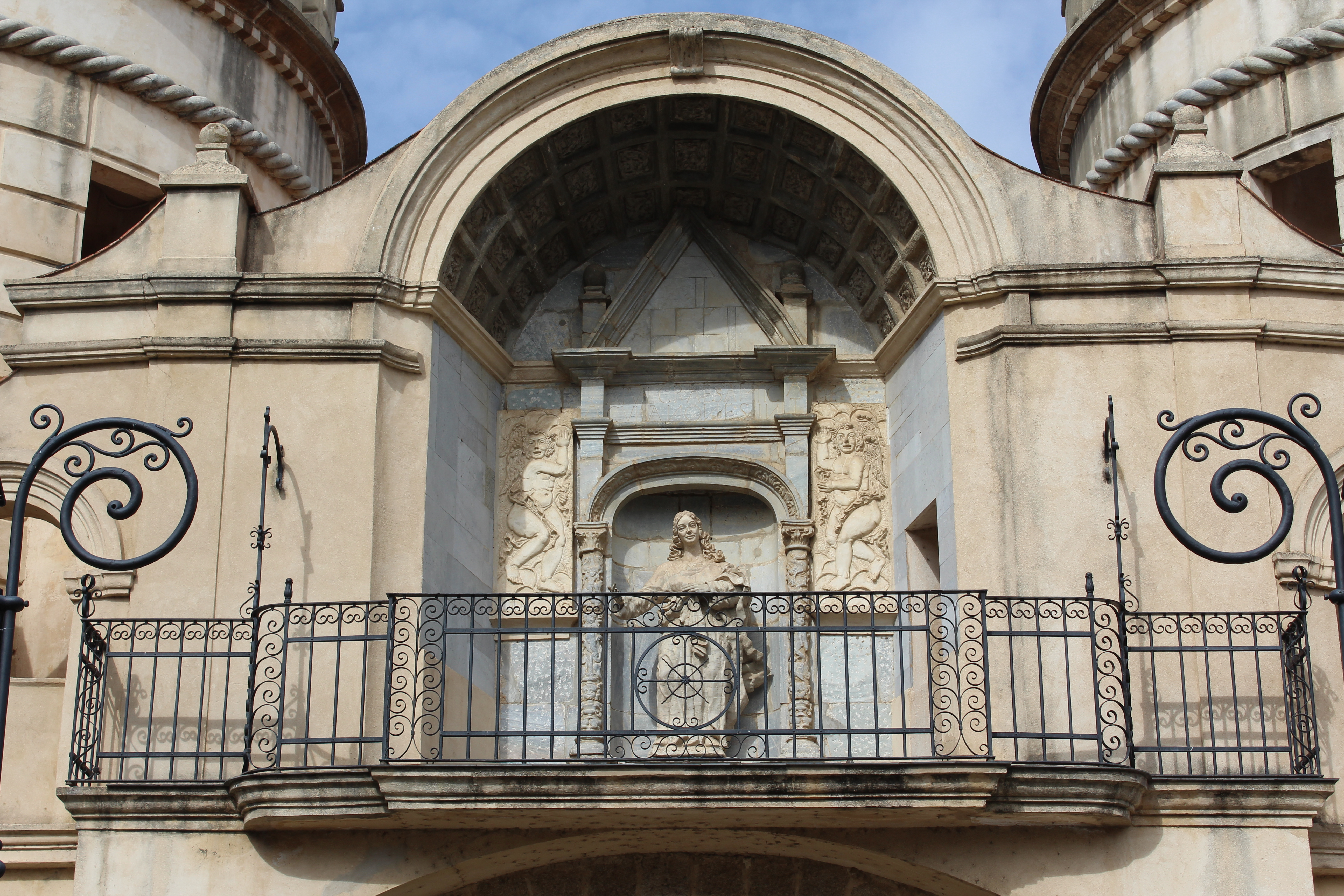 Hornacina con la Virgen de los Ángeles en fachada interior